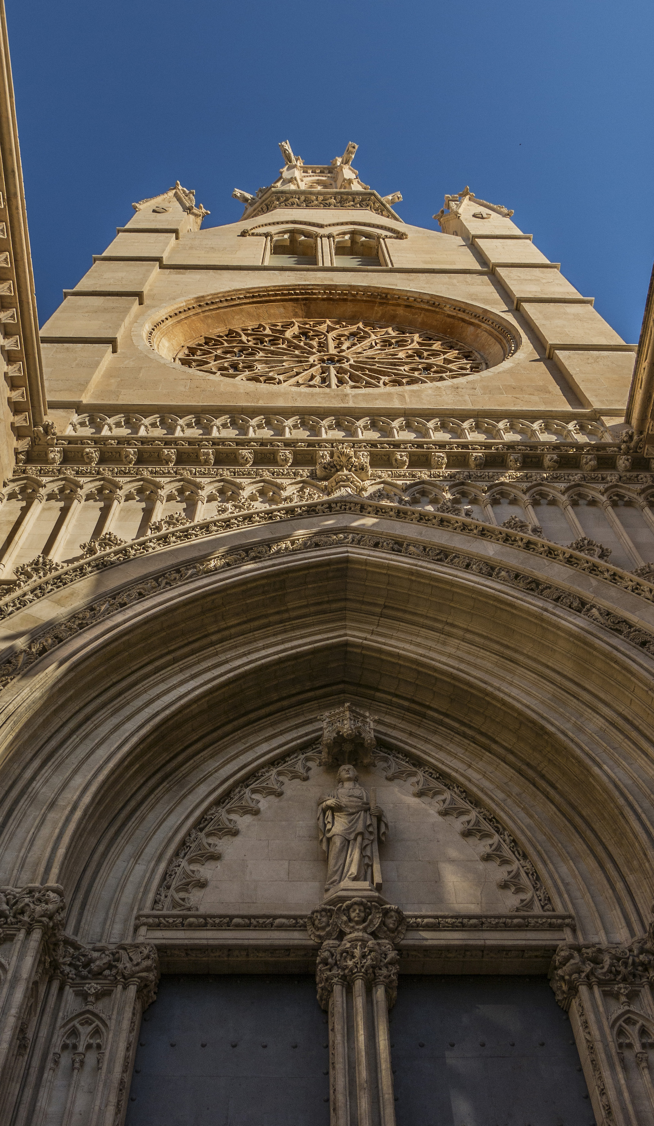 Església de Palma (Mallorca)